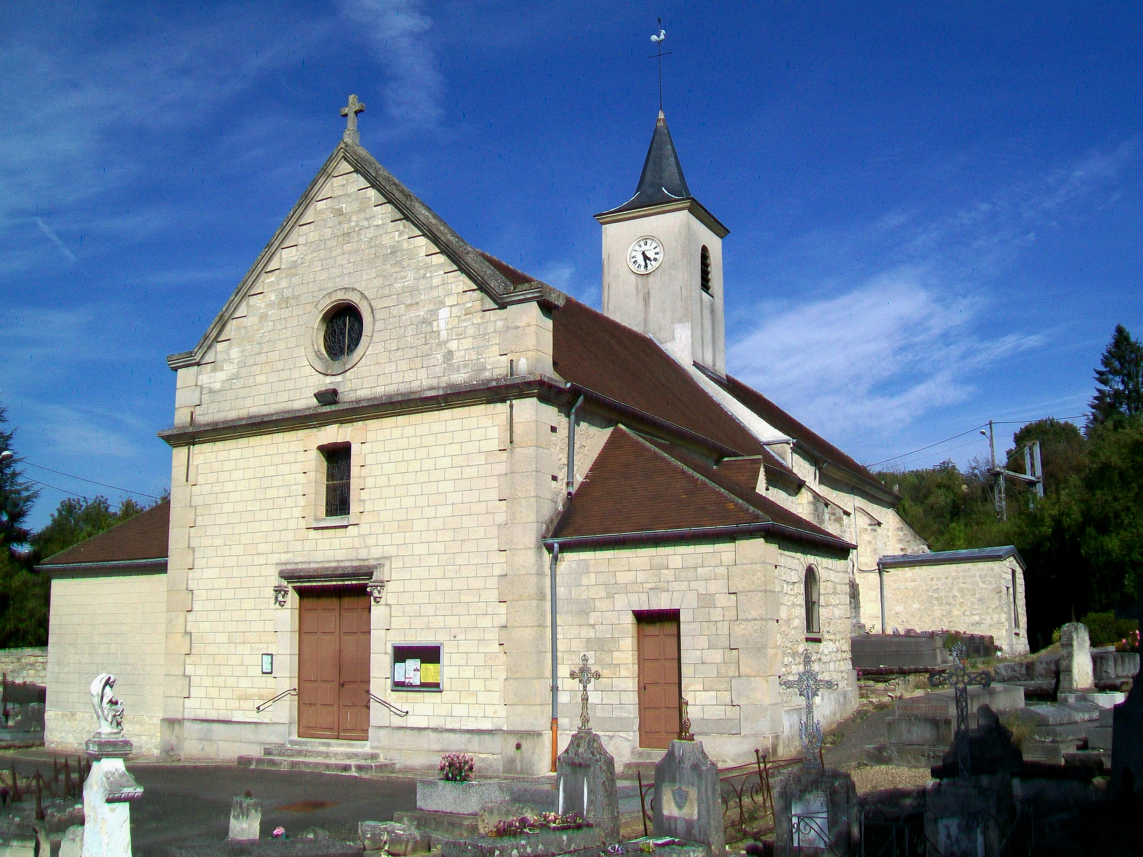 L'église Saint-Éloi, façade occidentale ; à l'angle de la rue de l'Église avec la rue du chemin Vert.